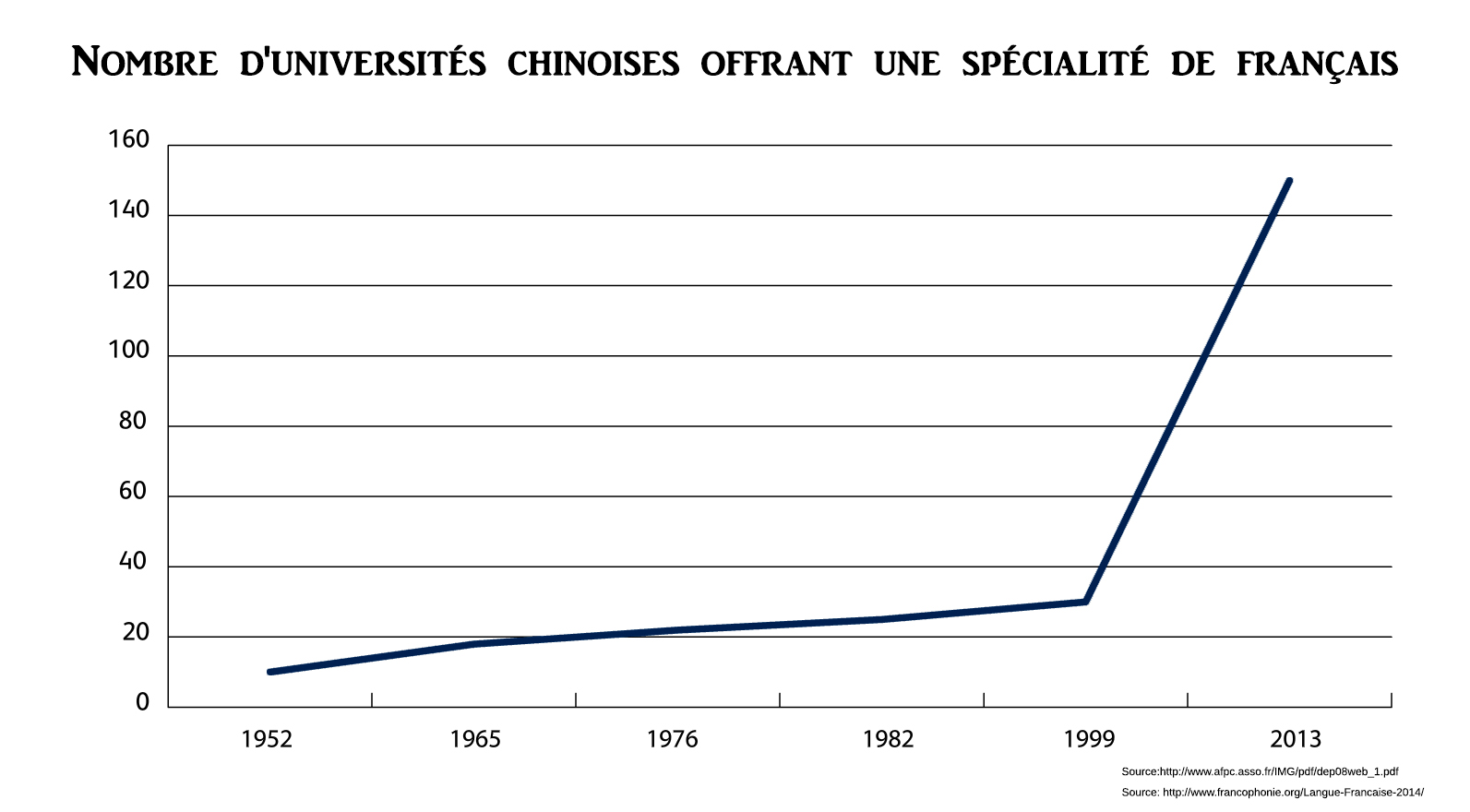 Nombre d'universités chinoises crée chaque année